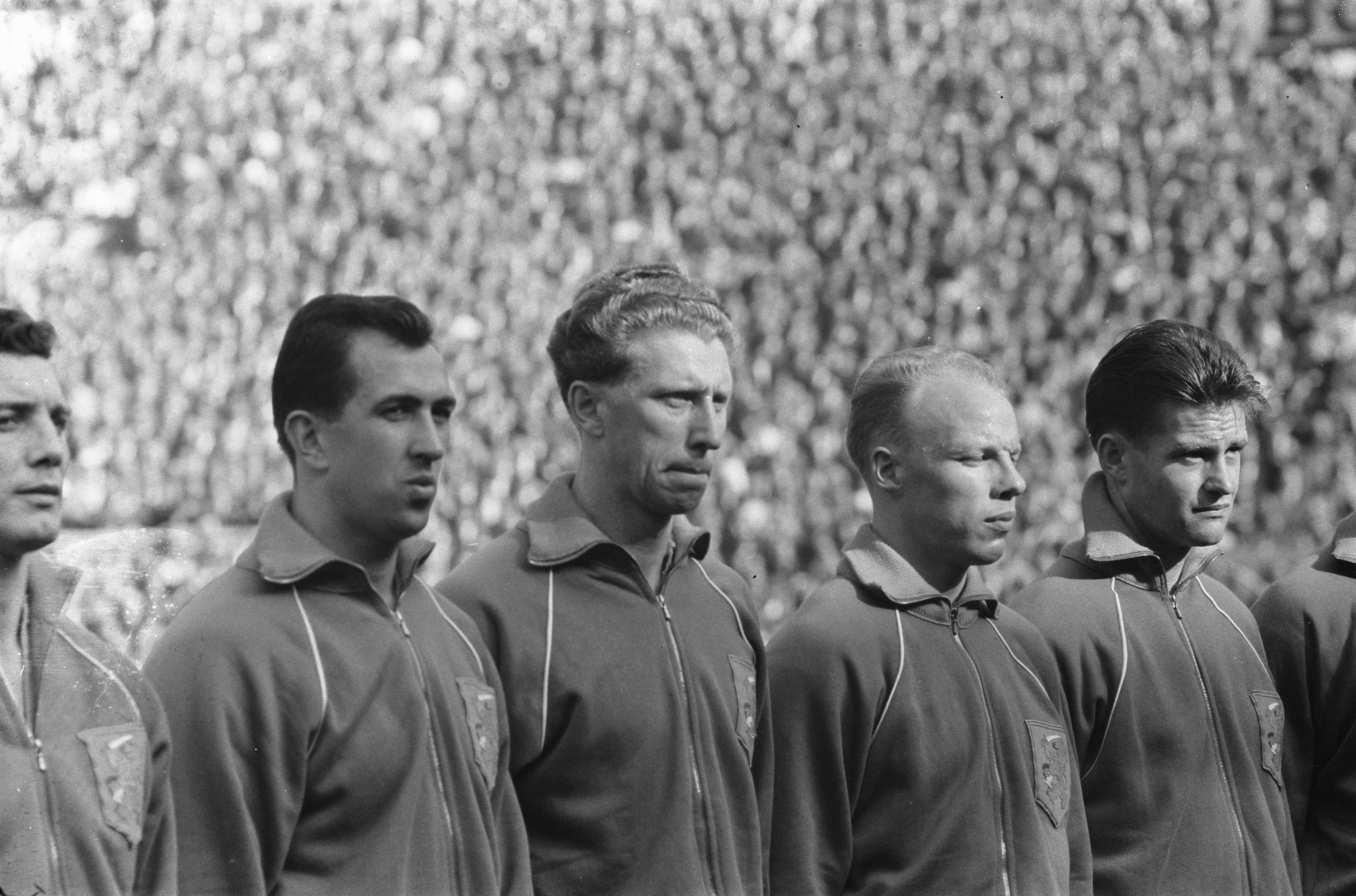 Voetbal Belgie tegen Nederland 1-4 te Antwerpen, v.l.n.r. Van der Hart, Pieters Graafland, Klaassens , Wiersma, Kuys - Location: België, Antwerpen